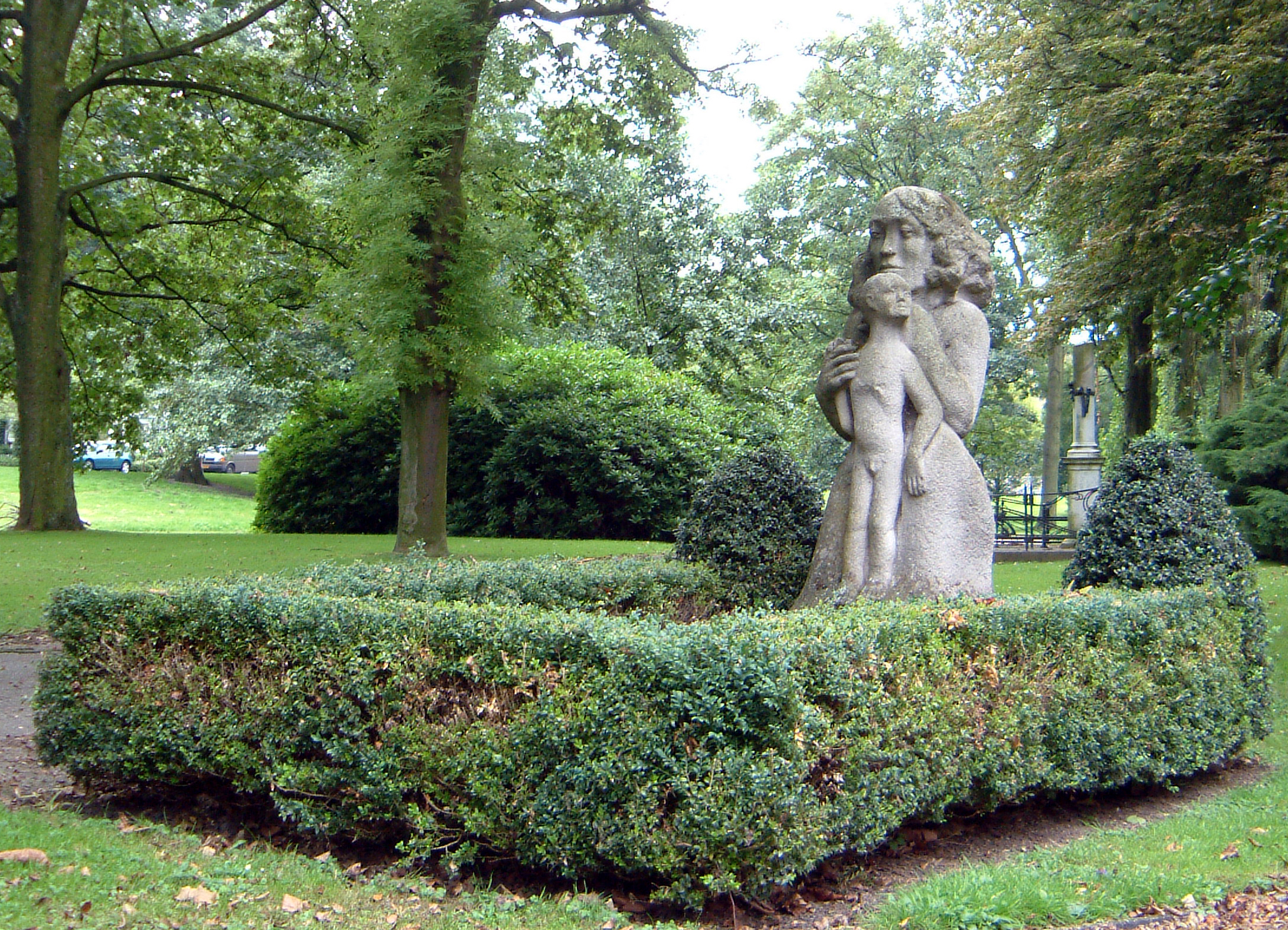 Grafmonument voor het familiegraf van Arie van Veen, vervaardigd door Henk Chabot.